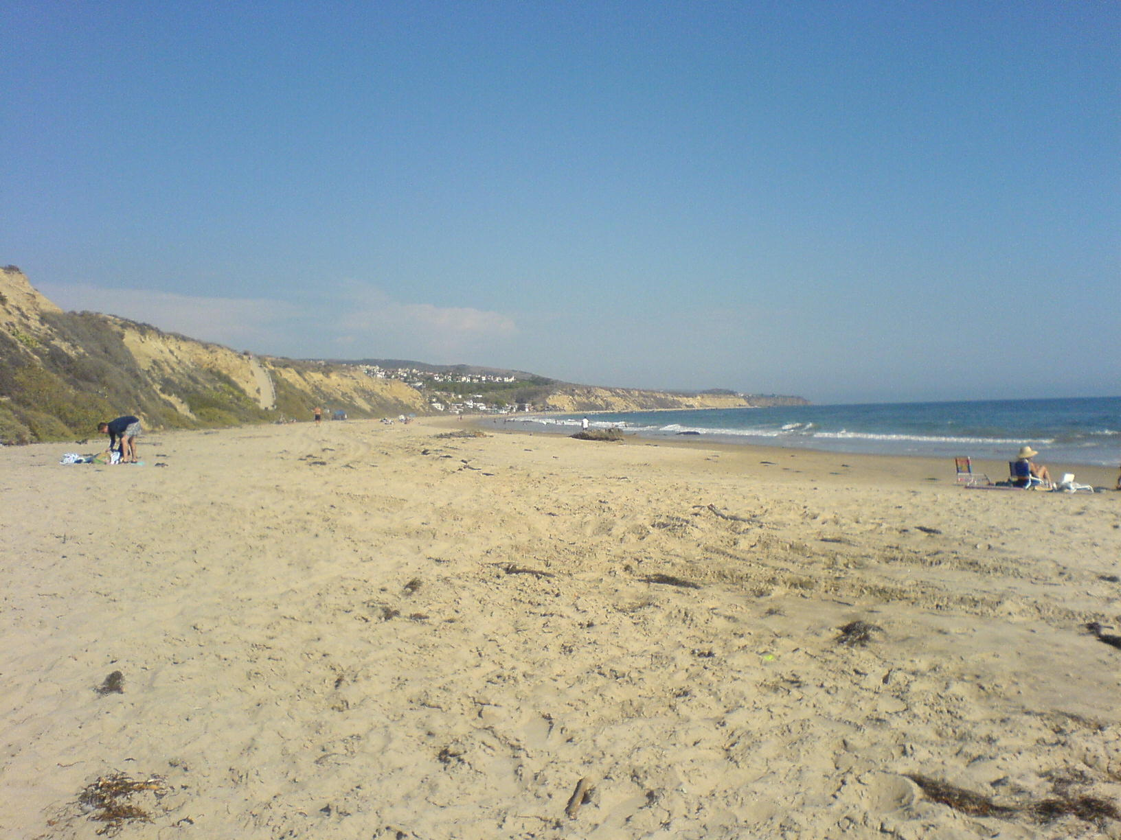 Crystal Cove Park liegt südlich von Newport Beach.